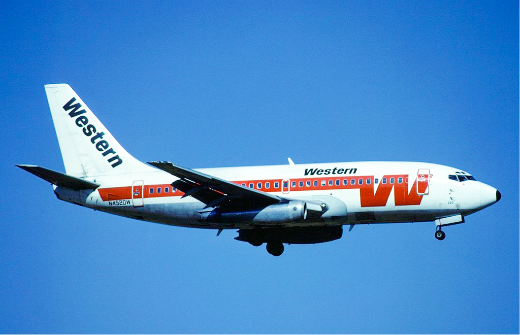 Western Airlines Boeing 737-200